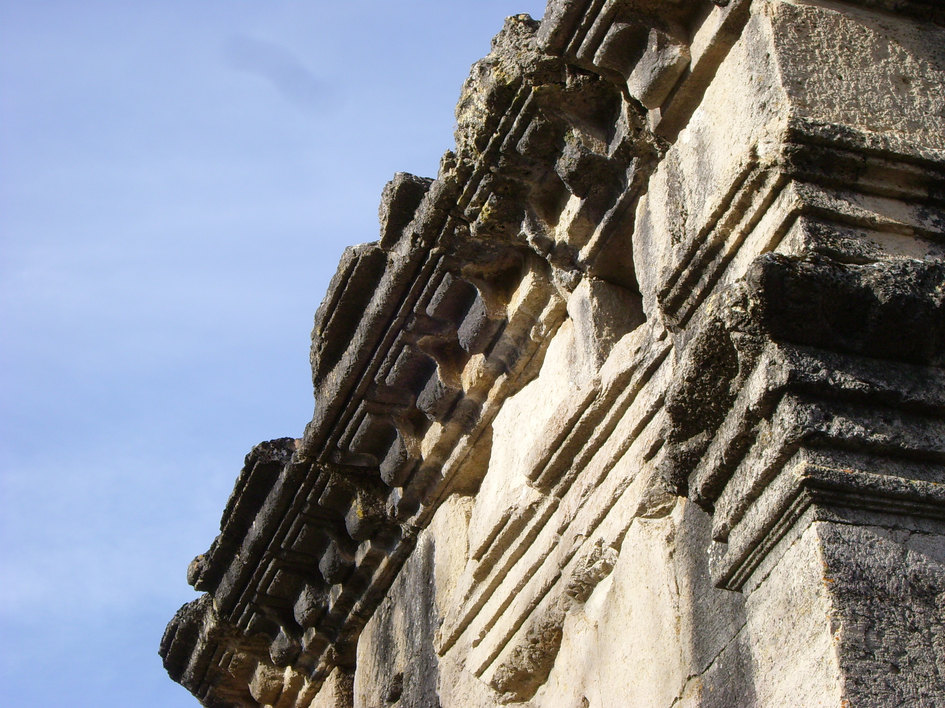 Mausolée de Lanuéjols (Lozère) : détail de la façade extérieur sud-est